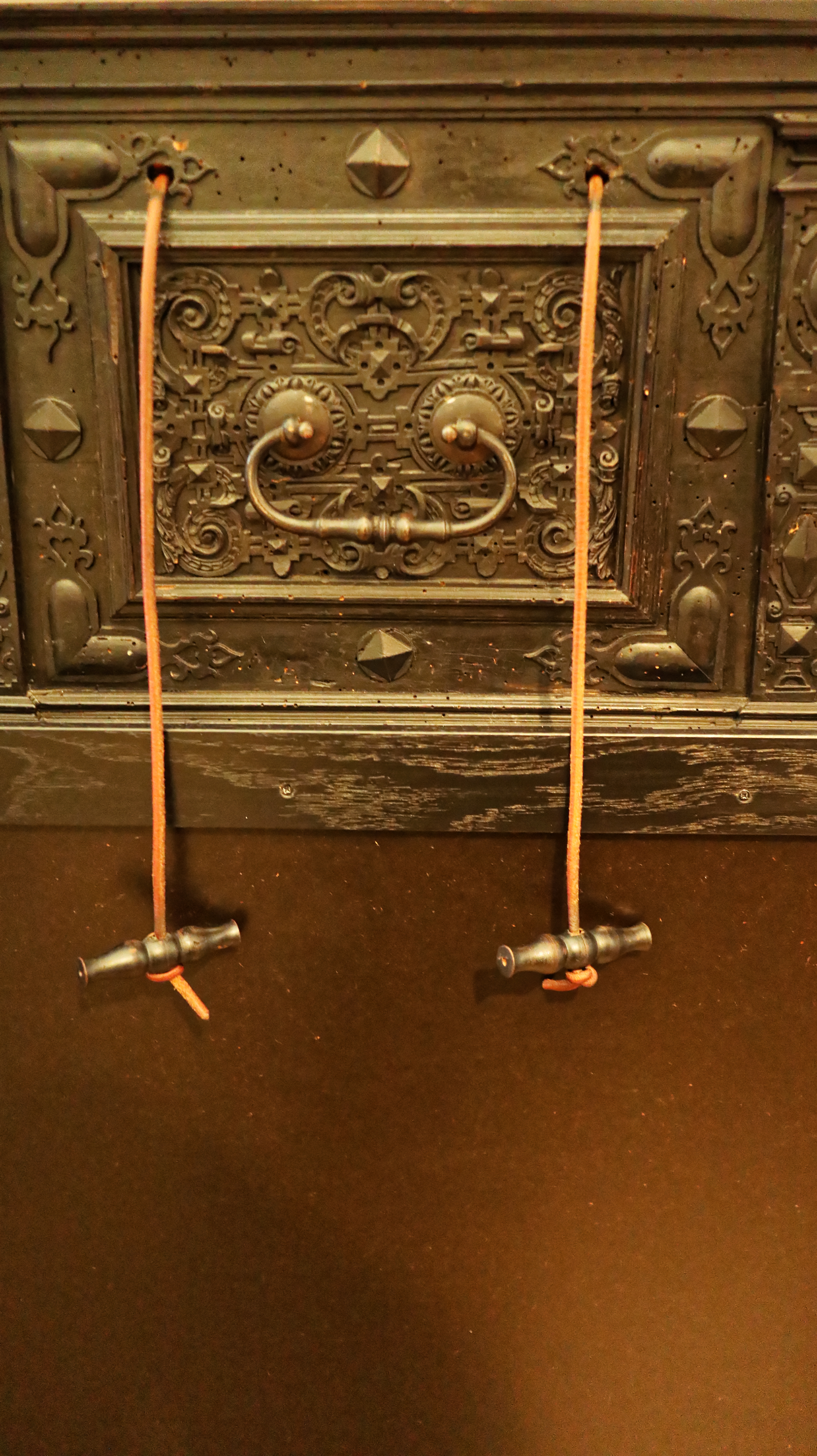 Wikipedianrinnen und Wikipedianer im Dommuseum. Im Mittelpunkt steht das Claviorganum. Claviorgana waren in der Renaissance, vor allem im ausgehenden 16. Jahrhundert, sehr beliebt. Funktionsfähig sind nur wenige geblieben, das wohl älteste noch spielbare Instrument ist das Claviorganum des Josua Pock, „Orgelmacher(s) zu Insprug“, aus dem Jahr 1591. Es ist das einzige Musikinstrument, das sich laut den Inventaren aus der Regierungszeit von Fürsterzbischof Wolf Dietrichs von Raitenau (1587-1612) in der Salzburger Residenz befunden hat.